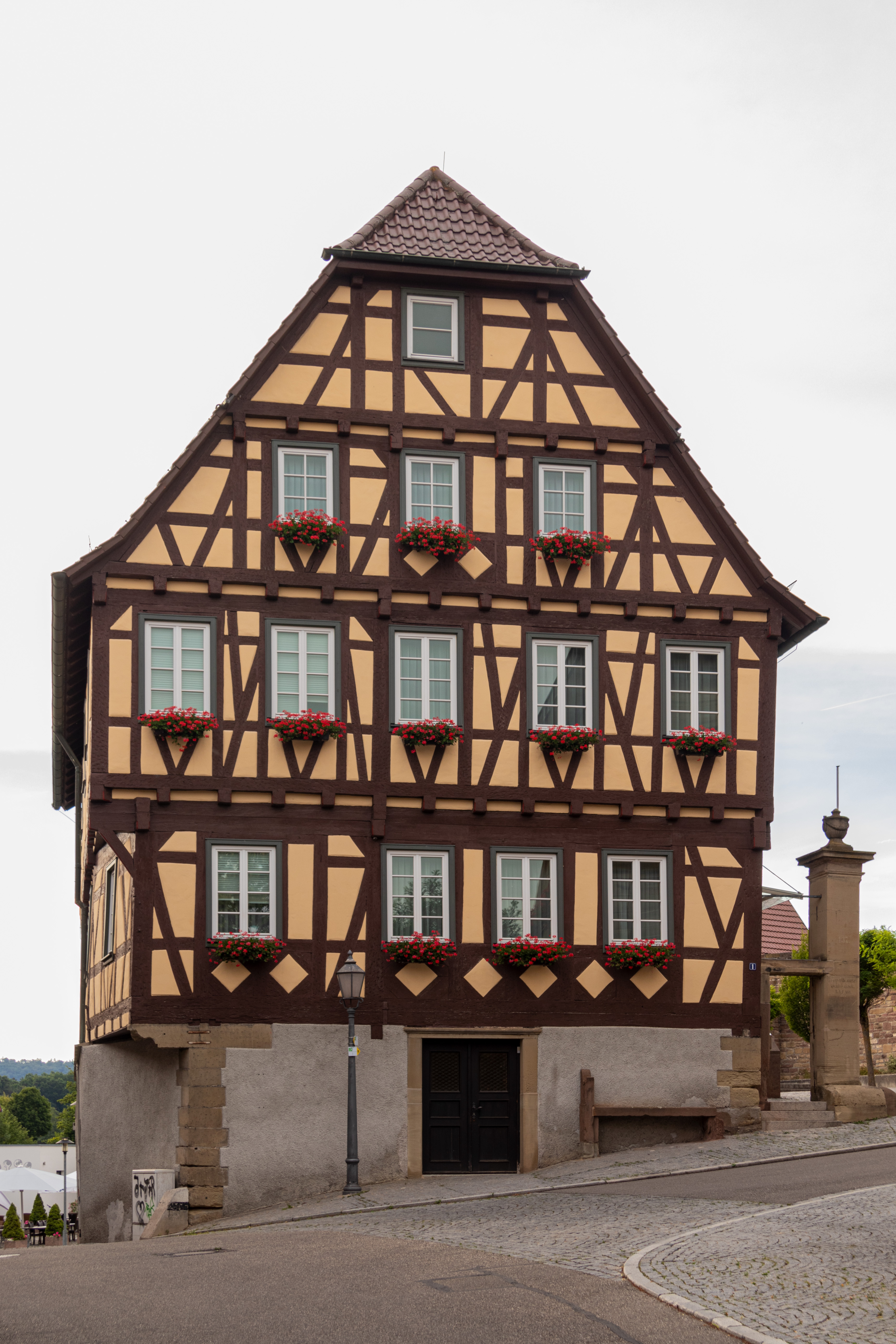 Giebel des denkmalgeschützten Hauses in der Schönenberger Straße 1, Ötisheim.